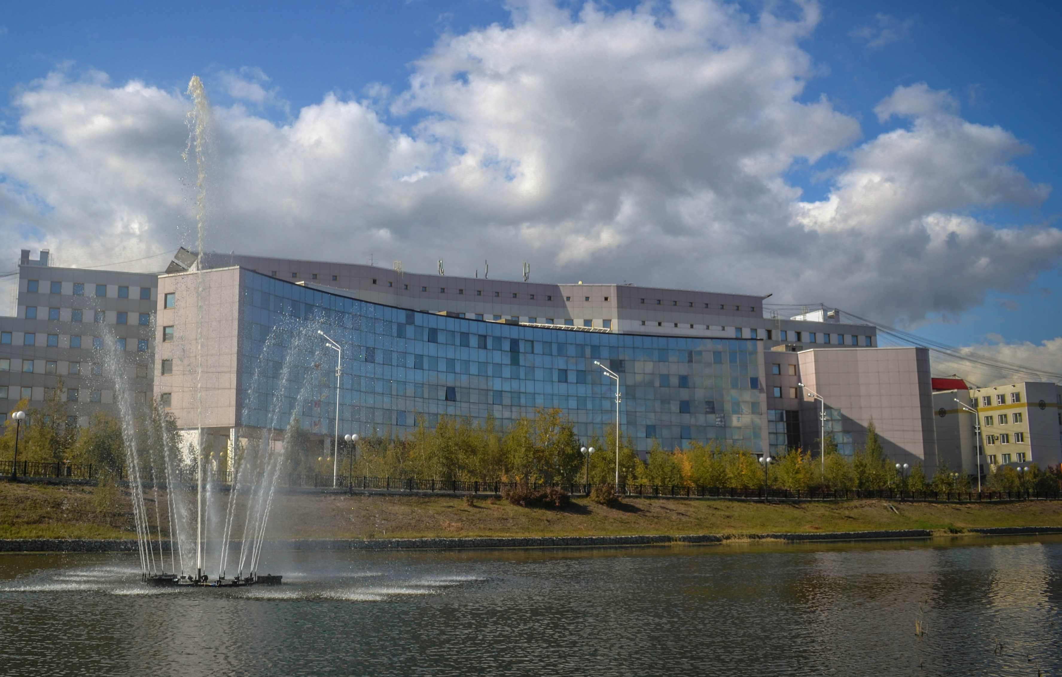 Корпус факультетов естественных наук СВФУ, август 2013 г.